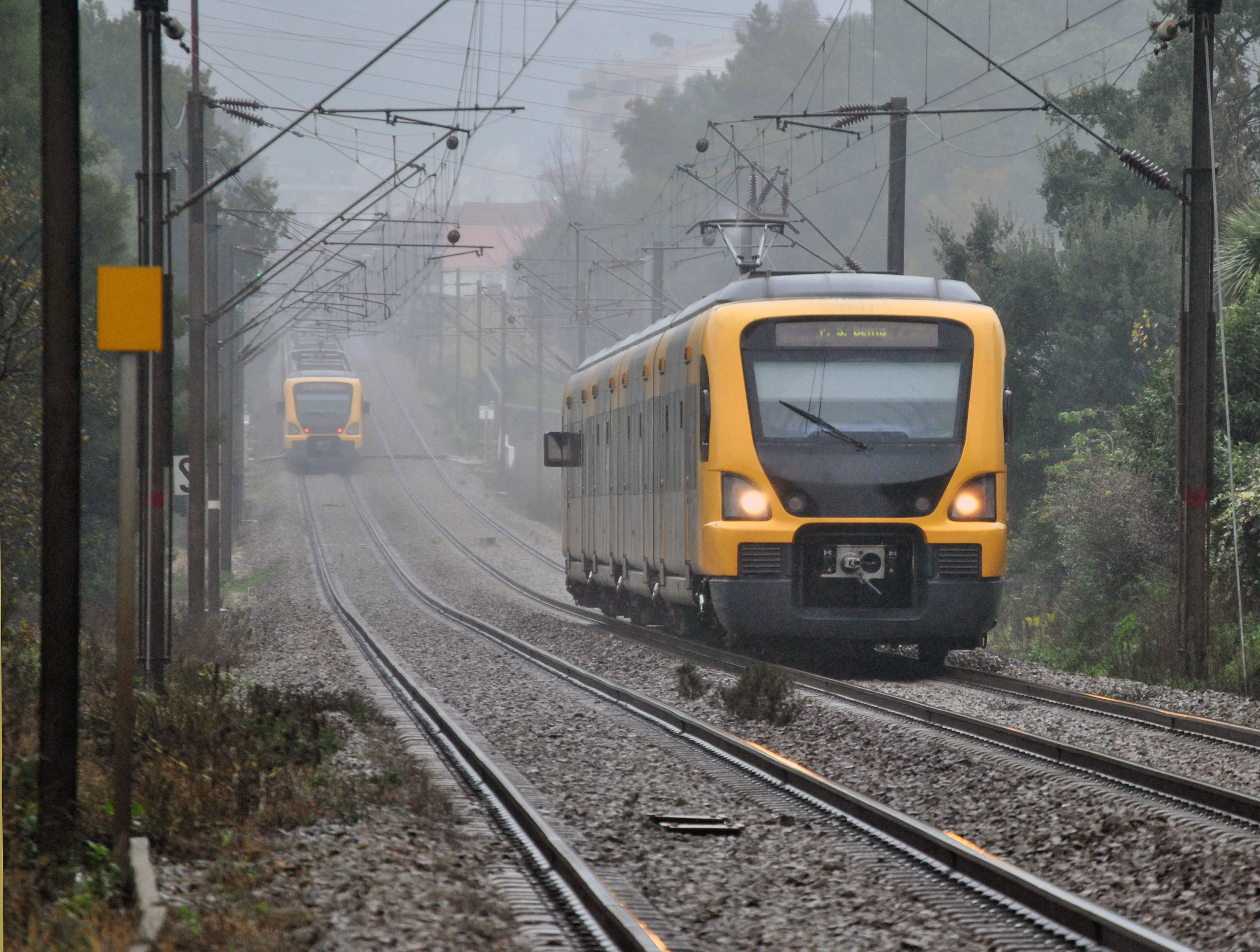 Cruzamento de UME´s em Rio Tinto